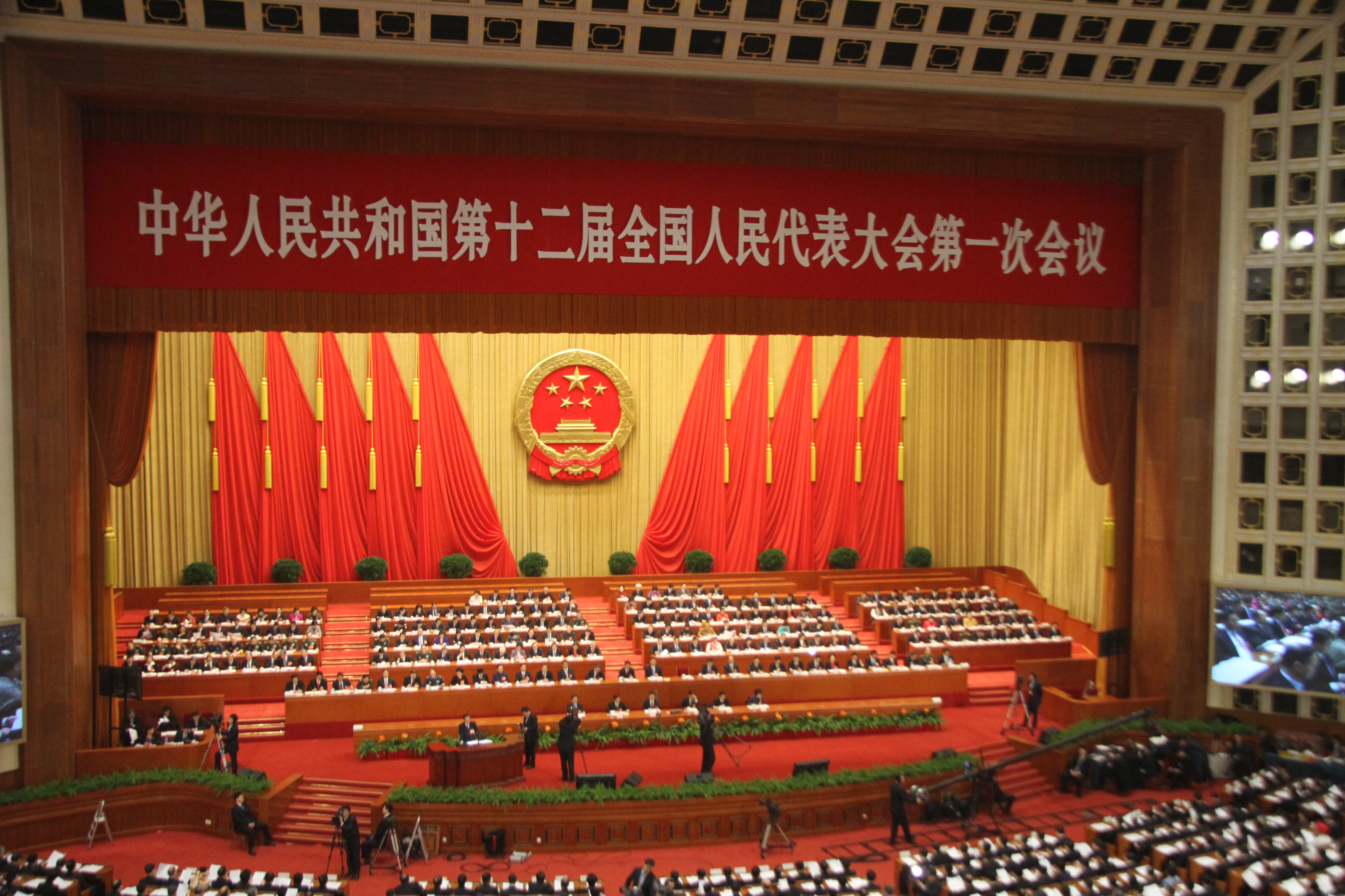 第十二届全国人民代表大会第一次会议在北京人民大会堂开幕。